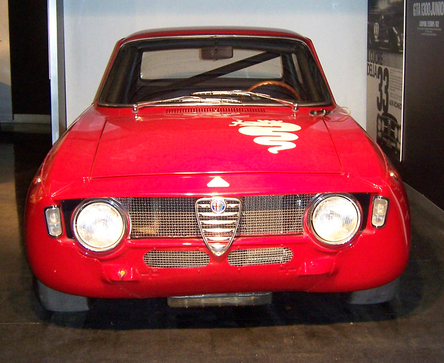 Alfa Romeo GTA 1300 Junior im Alfa Romeo Museum in Arese